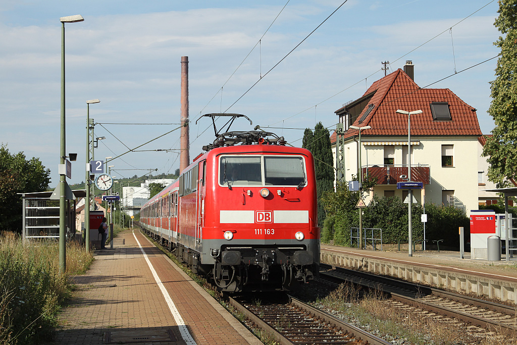 Nahverkehr auf der Frankenbahn (KBS 780)